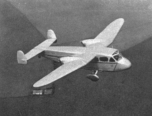 letoun Praga E-210 (1937)